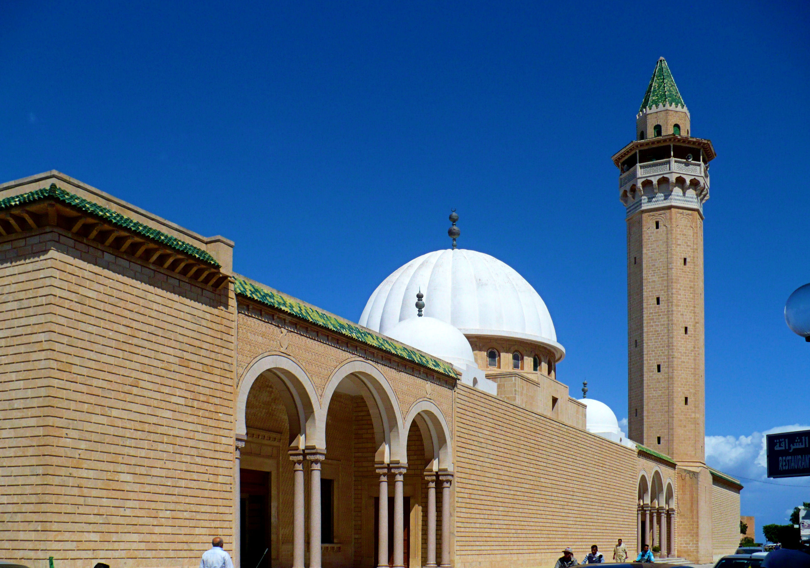 Monastyr, Meczet, Bourguiba Mosque